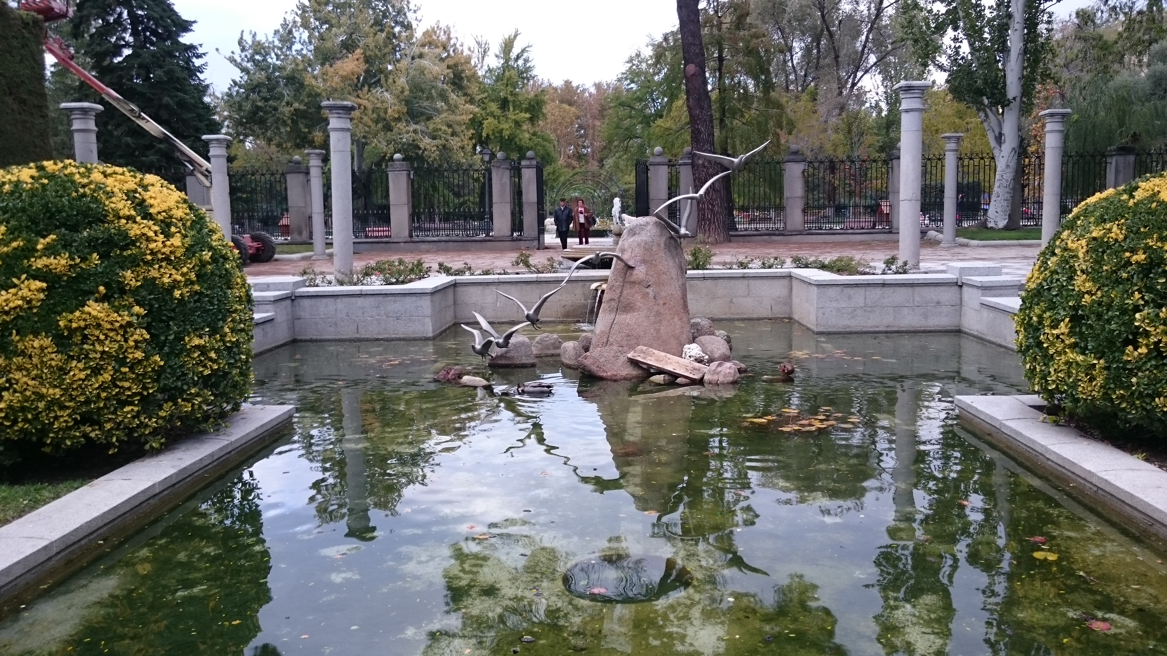 Jardines de Cecilio Rodríguez en el Retiro de Madrid